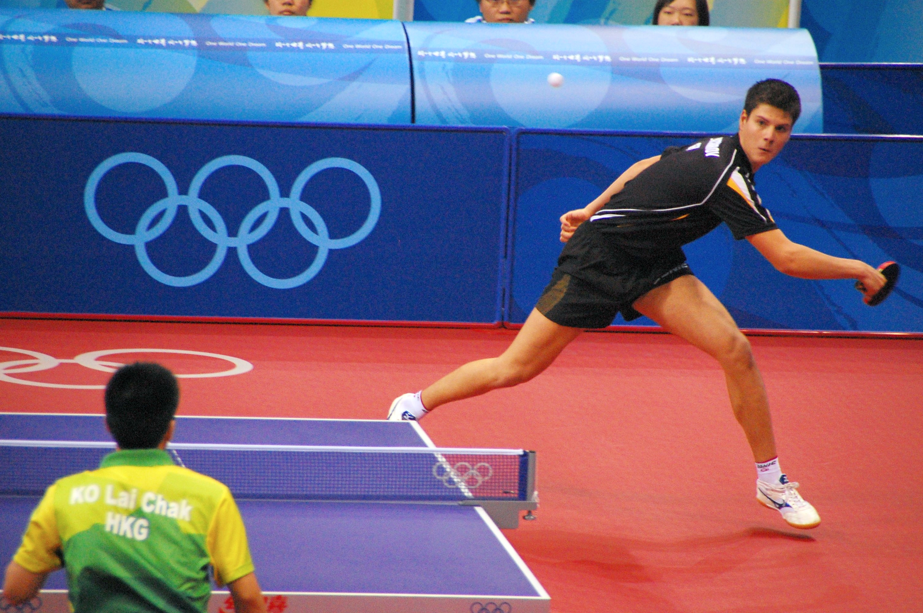 Demitri lost against Ko Lai Chak